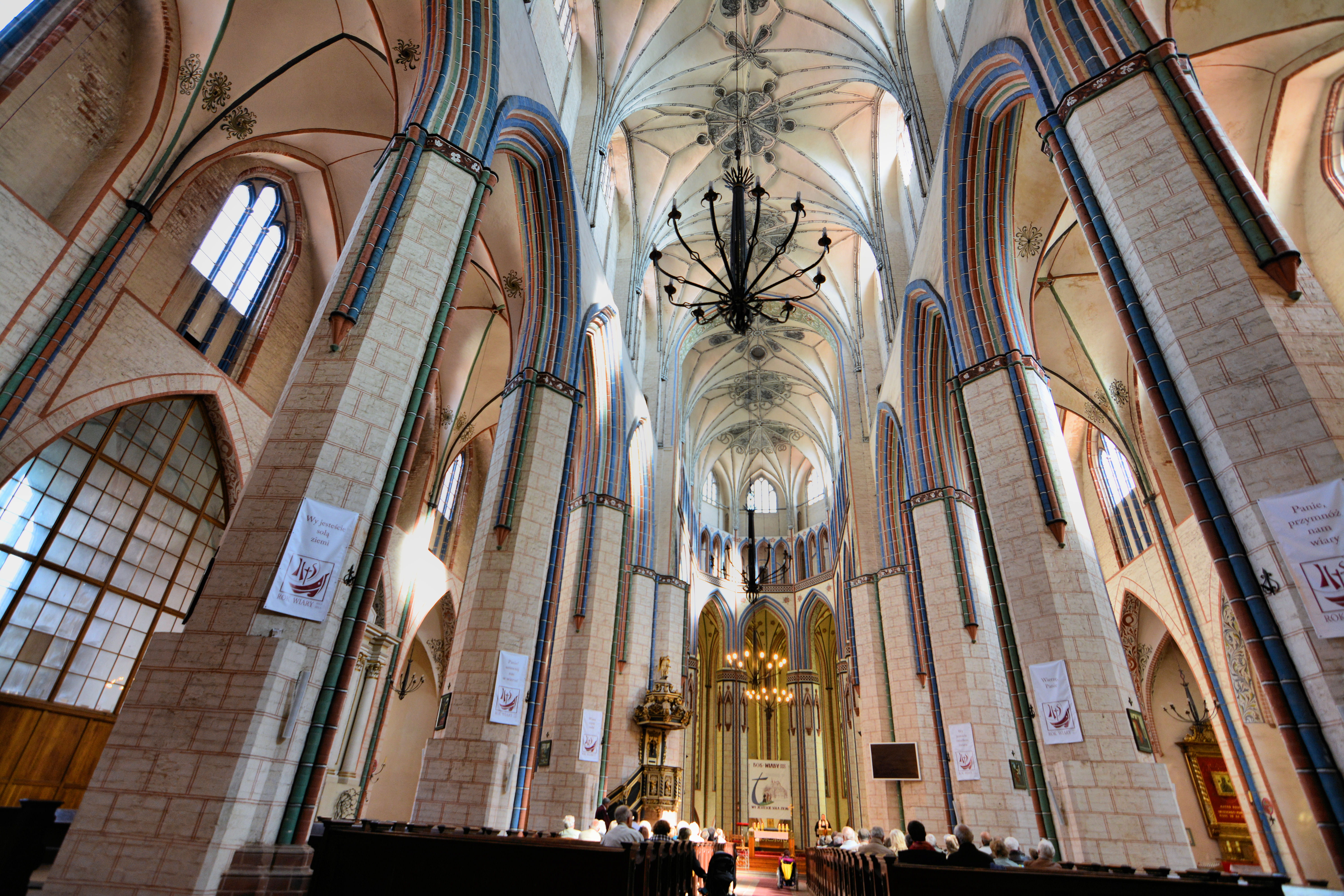 Stargard Szczeciński, kościół par. p.w. NMP Królowej Świata, kon. XIII, XIV, XVII, 1819-24, 1905-11